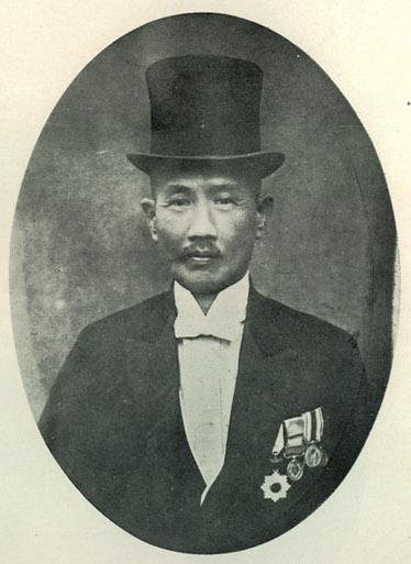 Bân-lâm-gú: Khó͘ Têng-kong 許廷光